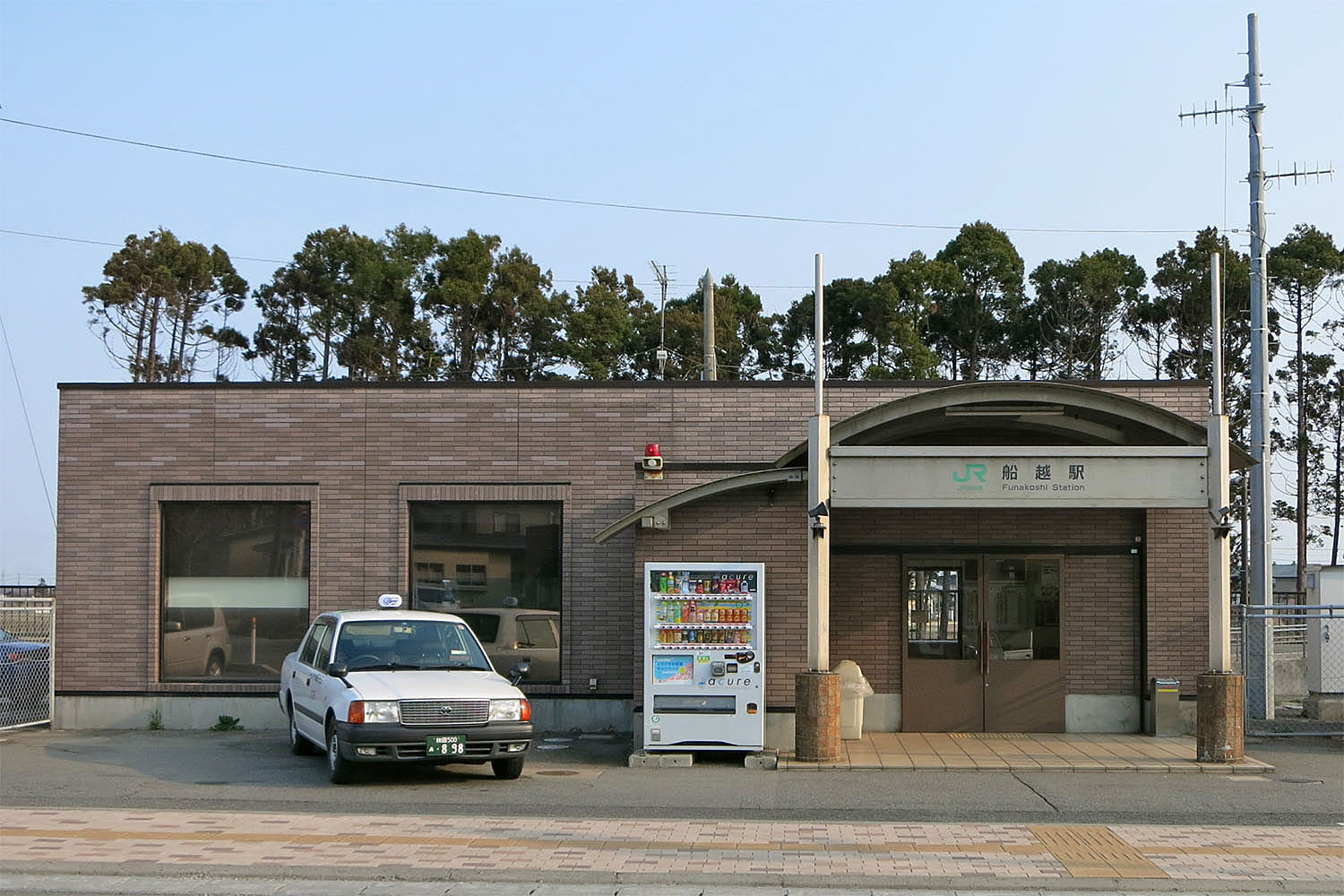 男鹿線船越駅